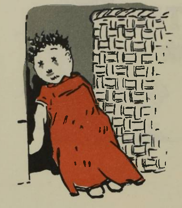 Design original da boneca Emília.